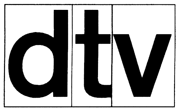 Altes Logo des Deutschen Taschenbuch Verlags (bis 1996/97)